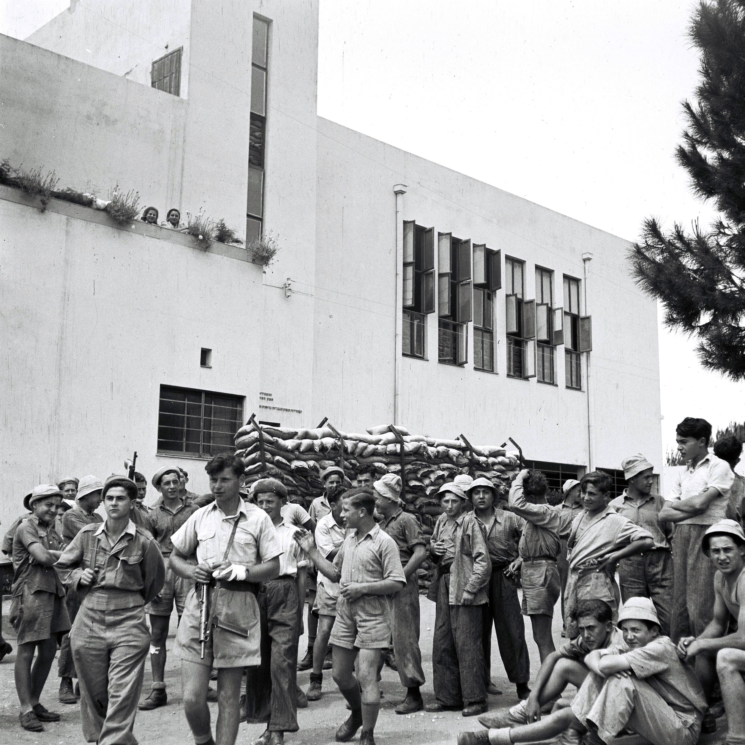 A GROUP OF YOUTH ALIYA YOUNGSTERS GOING OUT TO TRAIN WITHIN THE FRAMEWORK OF THE HAGANA. קבוצת בני נוער של עליית הנוער יוצאת לאימון במסגרת ארגון ההגנה. Photo: KLUGER ZULTAN, 04/04/1948 .